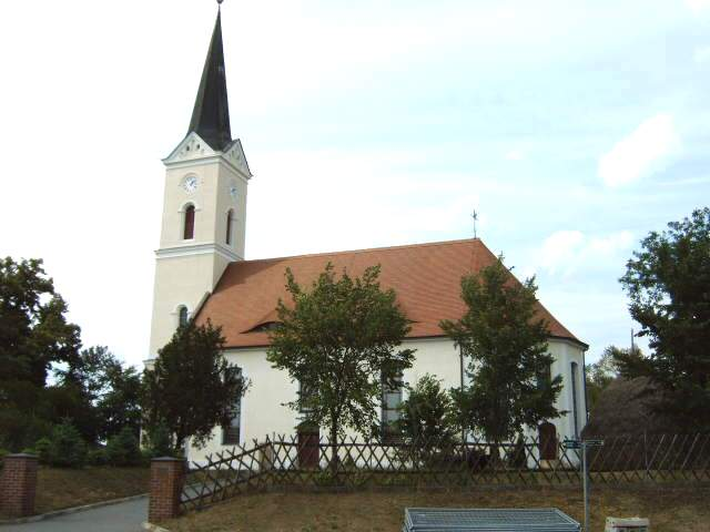 Kirche in Zerkwitz, Lübbenau, Land Brandenburg, Deutschland, Bild aufgenommen am 25. Juni 2006 von Olaf Meister